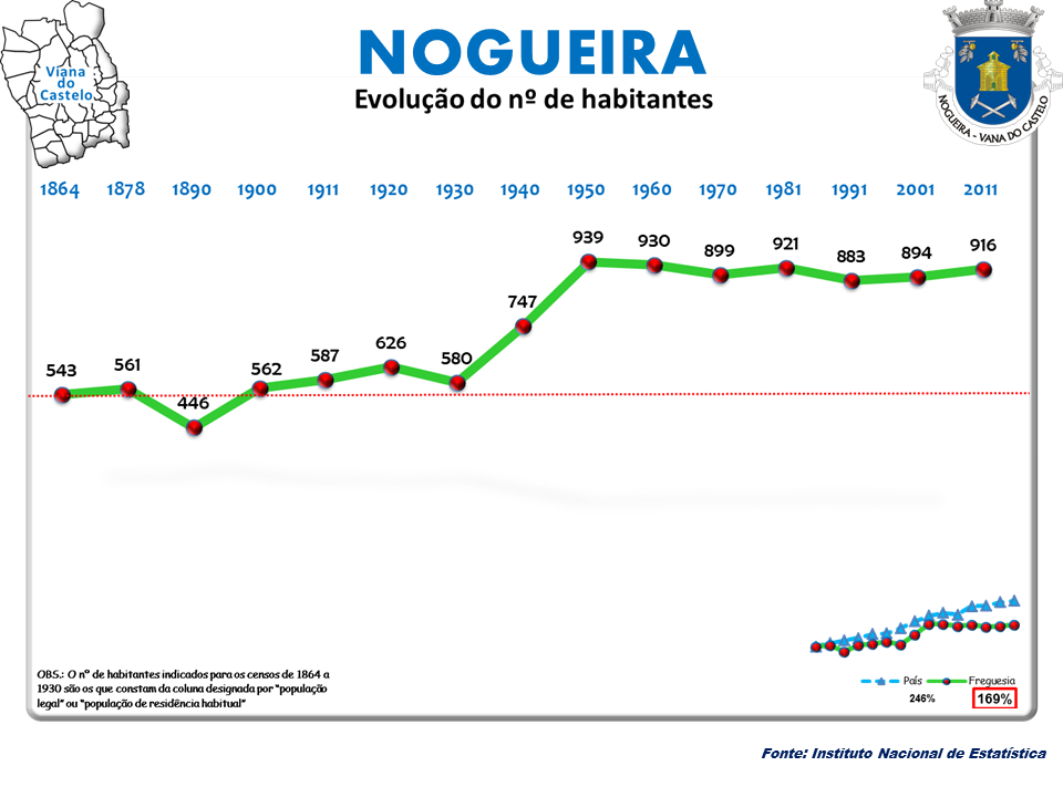 Censos 1864/2011